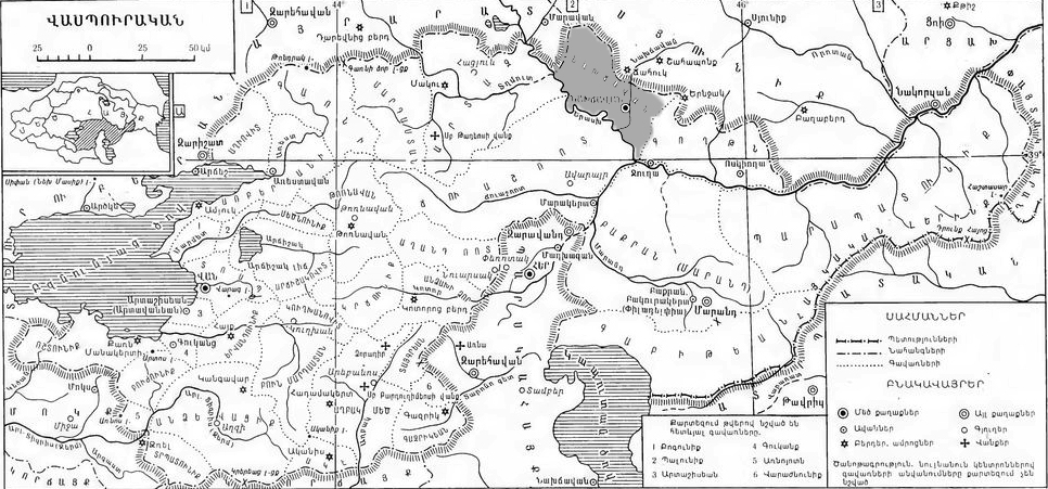 Վասպուրական